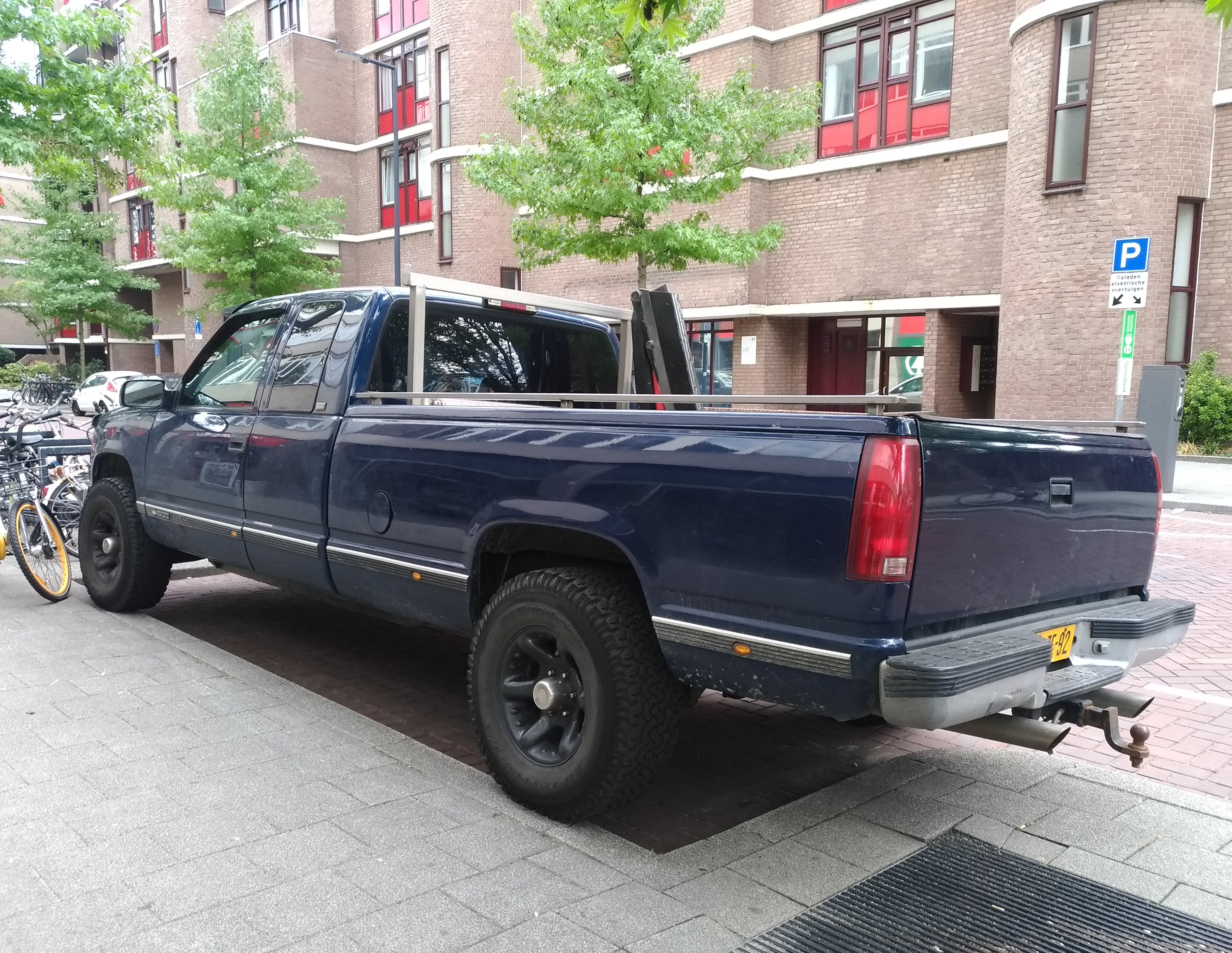 1996 Chevrolet K1500 (V8 4.8 253 hp) at Rotterdam